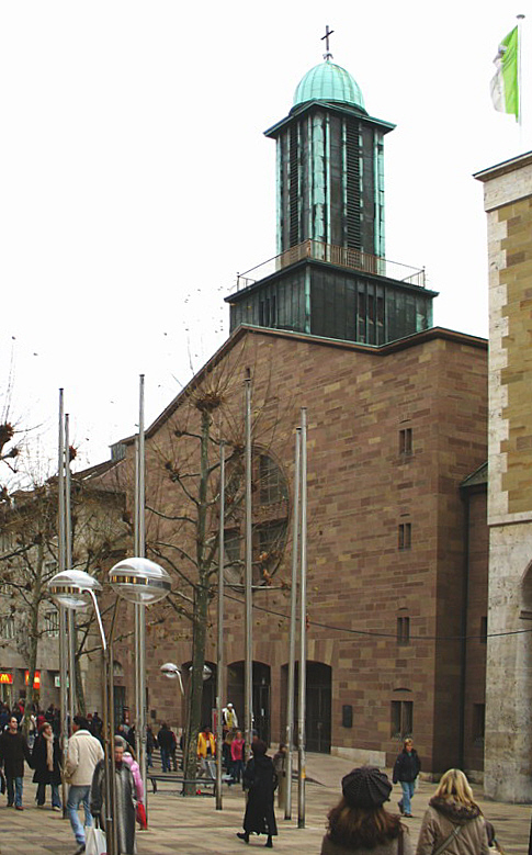 Stuttgart: Kath. Domkirche St. Eberhard Königstrasse